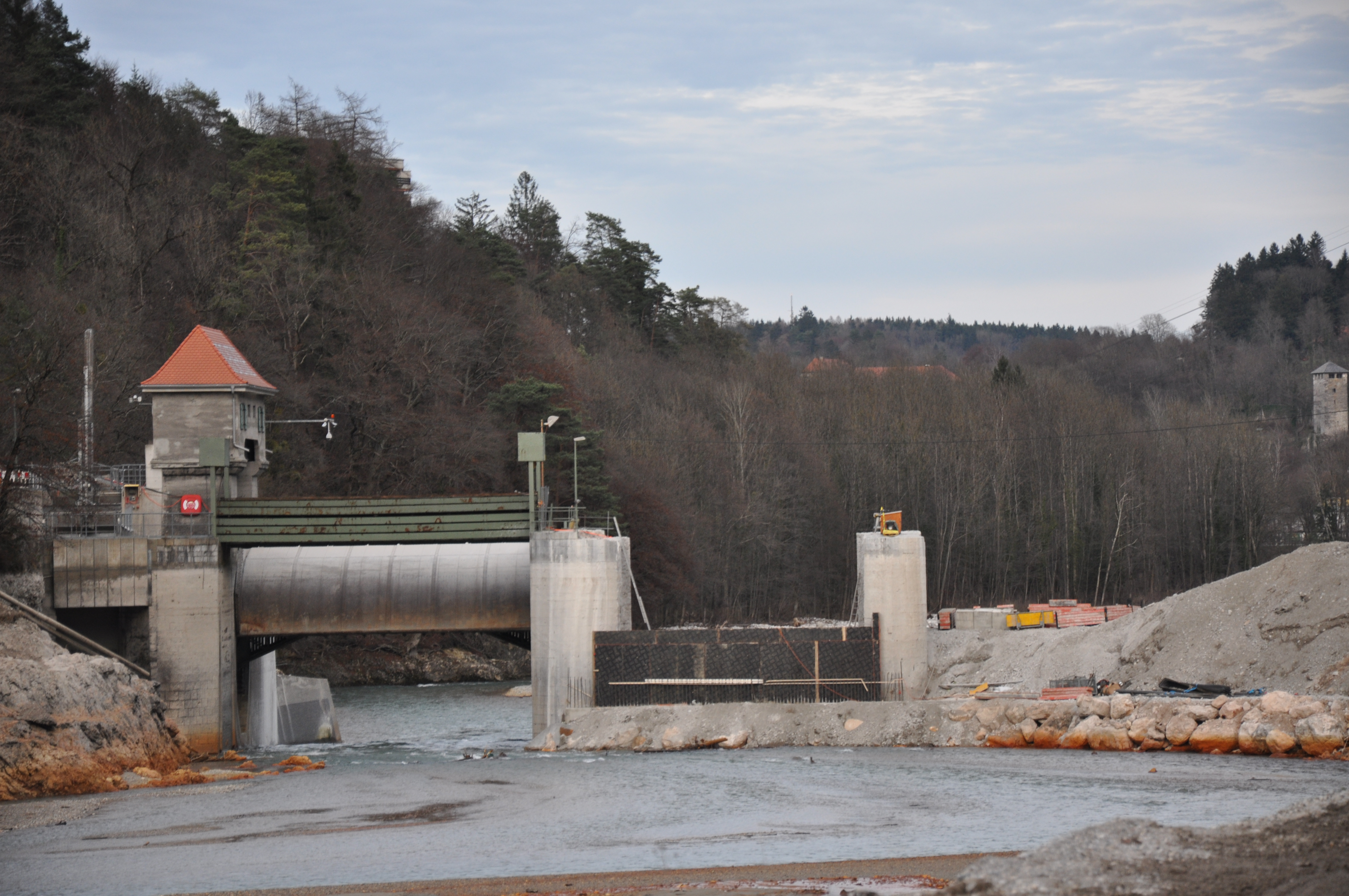 Bauarbeiten am Saalachsee. Die Hochwasserschleuse und die Mauer sind abgerissen. Die Grundschleuse (links) ist vollständig geöffnet.